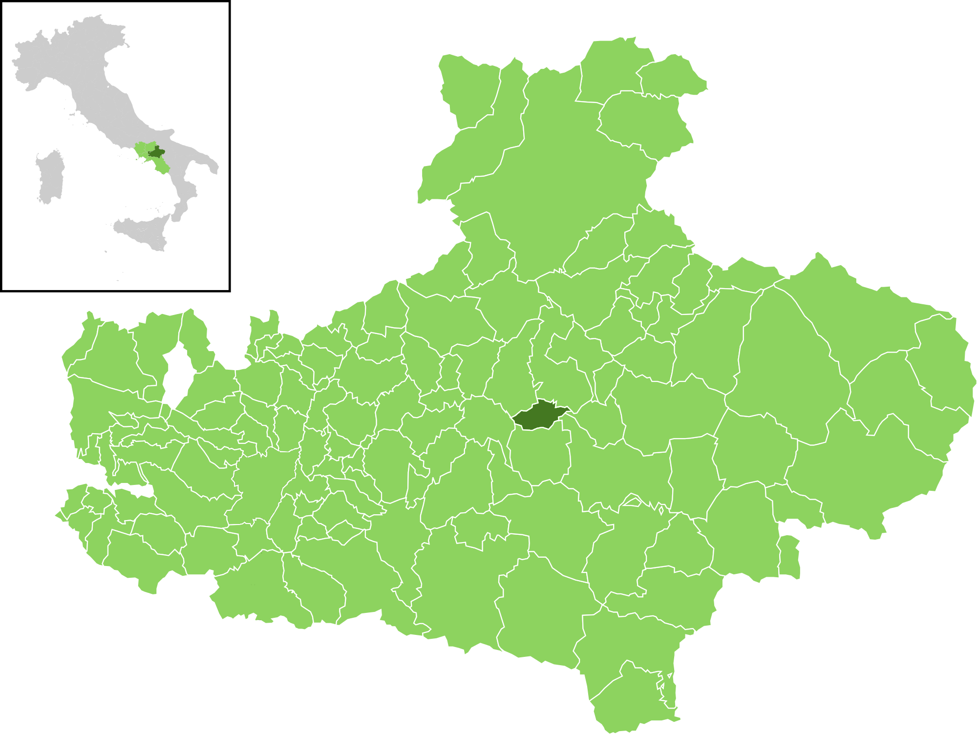 Posizione del comune all'interno della provincia di Avellino